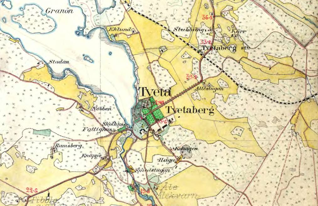 Del av Häradsekonomiska kartan visande Tveta kyrka, Tveta kyrka, Tvetaberg 1